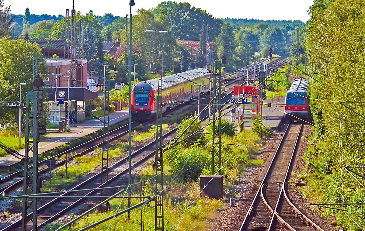 Der Bahnhof Langwedel hat drei Gleise für den Personenverkehr. Die Gleise 1 und 2 sind die Hauptgleise der Bahnstrecke Hannover–Bremen, Gleis 4 ist das Hauptgleis der Strecke Uelzen–Langwedel. Auf Gleis 4 hält die Regionalbahn (RB) 24284 Uelzen–Bremen Hbf. Eingesetzt wird ein Triebwagen der DB-Baureihe 614, der im Betriebshof Braunschweig beheimatet ist. Auf Gleis 1 fährt die RB 24547 Bremen-Vegesack–Verden (Aller) ein. Die aus Doppelstockwagen zusammengestellten Wendezüge werden mit Lokomotiven der DB-Baureihe 111 bespannt.